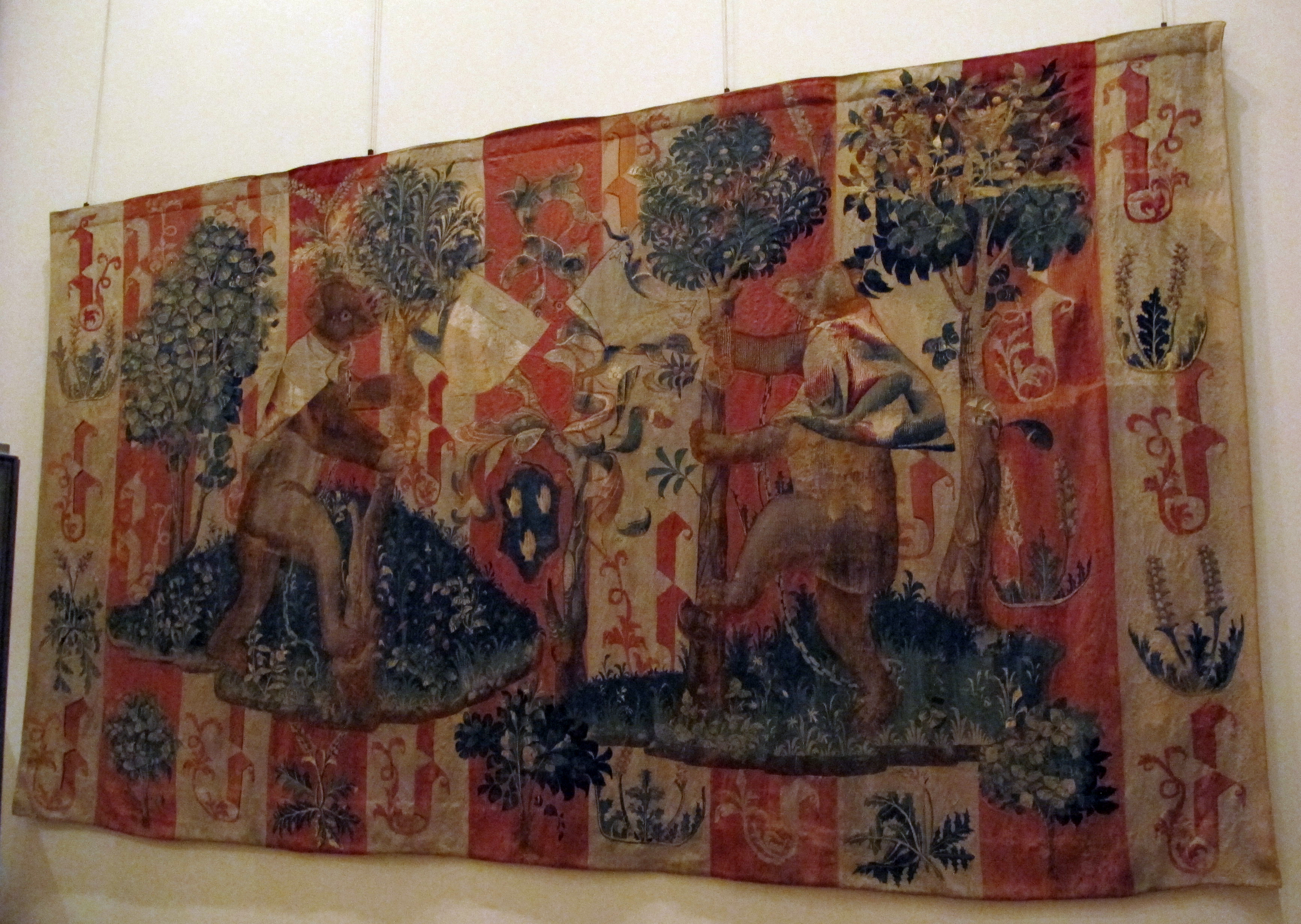 Arte decorativa, Louvre, Parigi